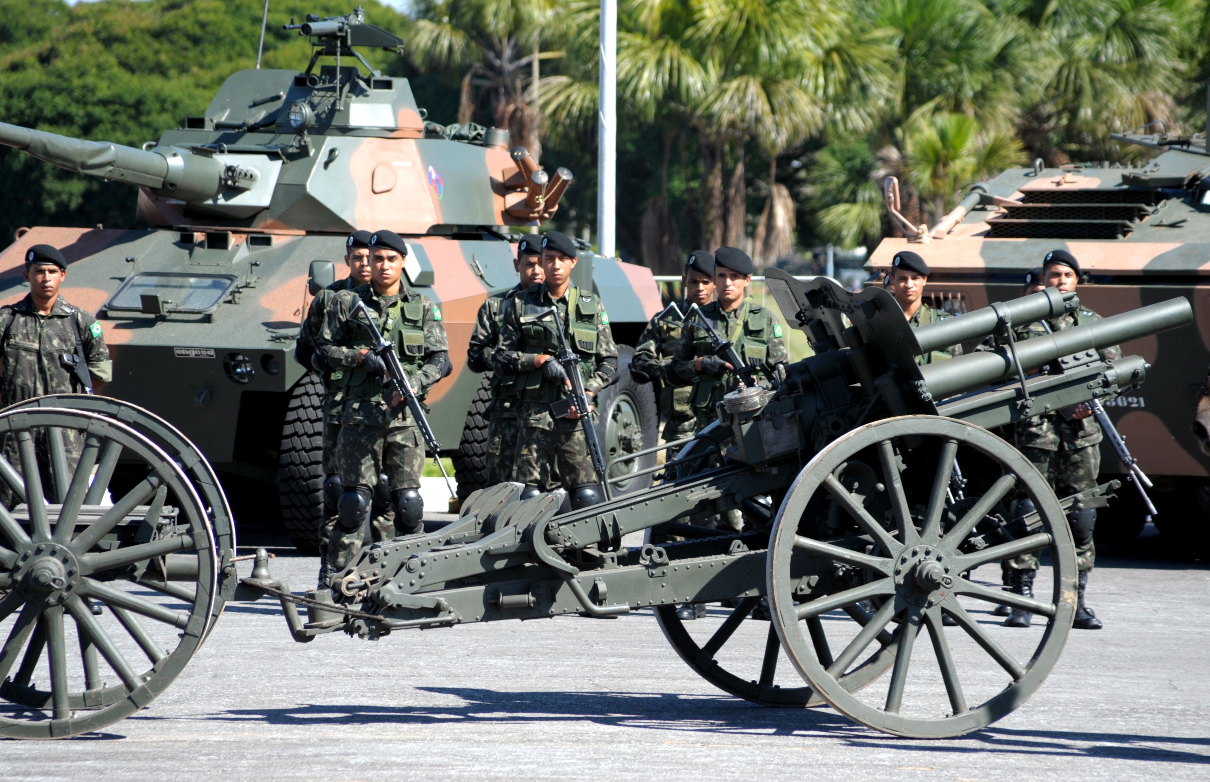 14/04/2014, Brasília - DF Fotos: Jorge Cardoso